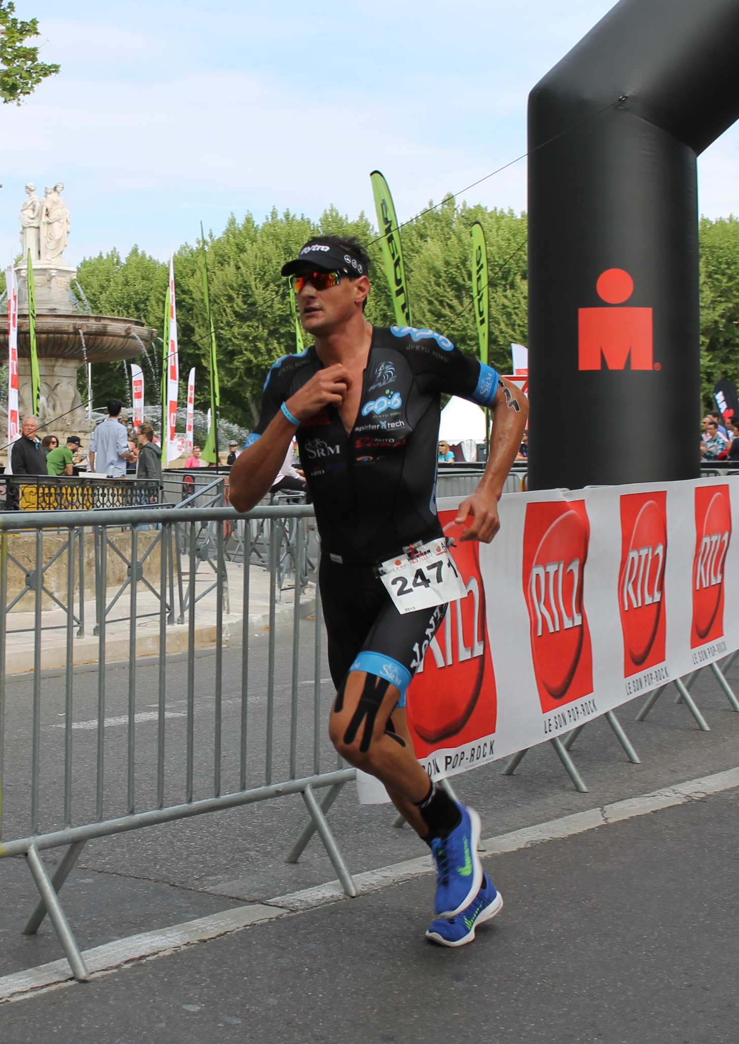 Ironman Pays d'Aix 2015